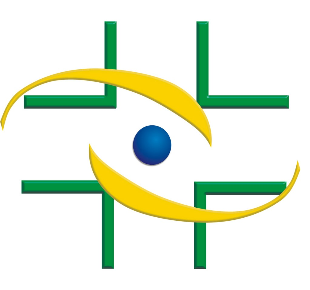 Logotipo oficial da Anvisa